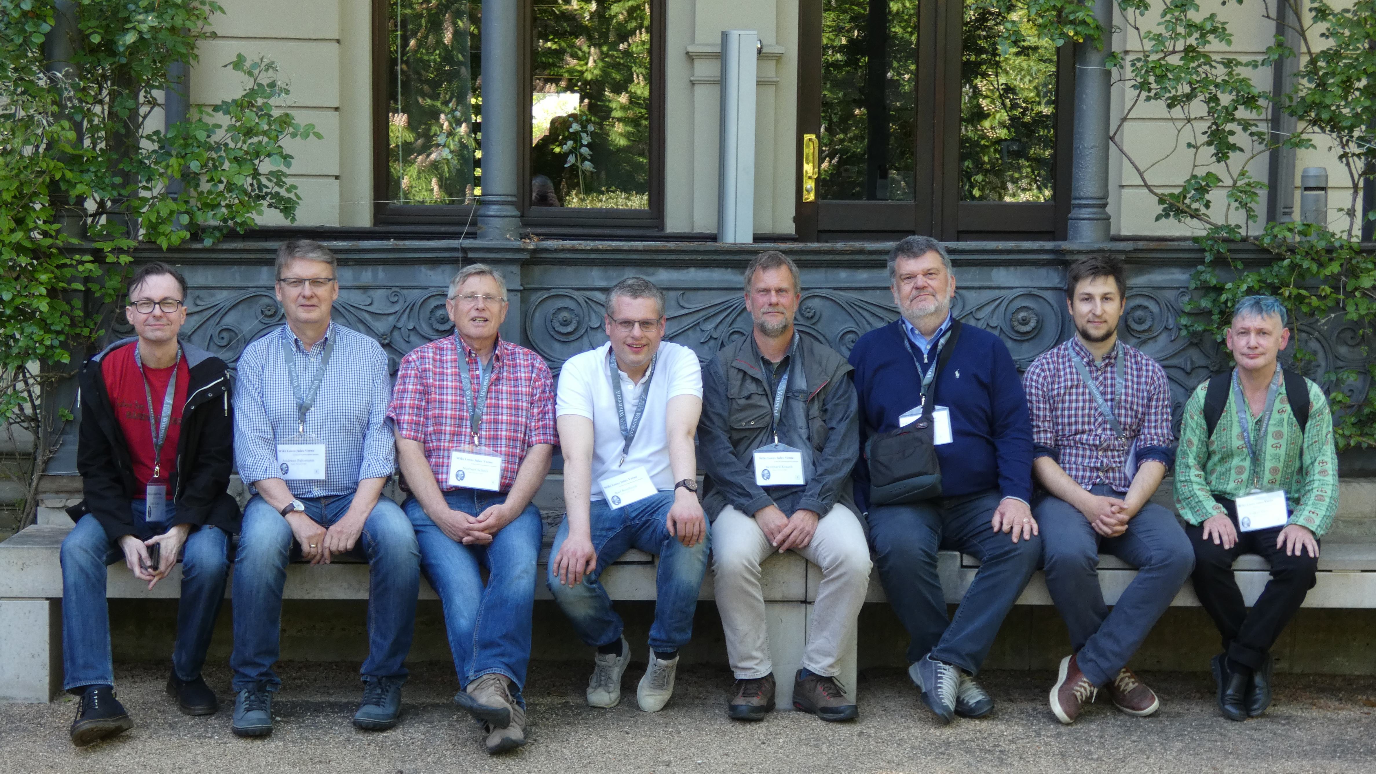 Jules Verne Club Gruppenfoto 01, Wiki Loves Jules Verne in Braunschweig 2018